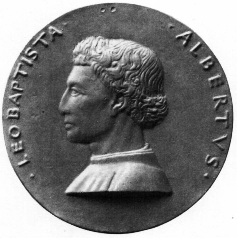 Leon Battista Alberti by Matteo de Pasti (1446-50)